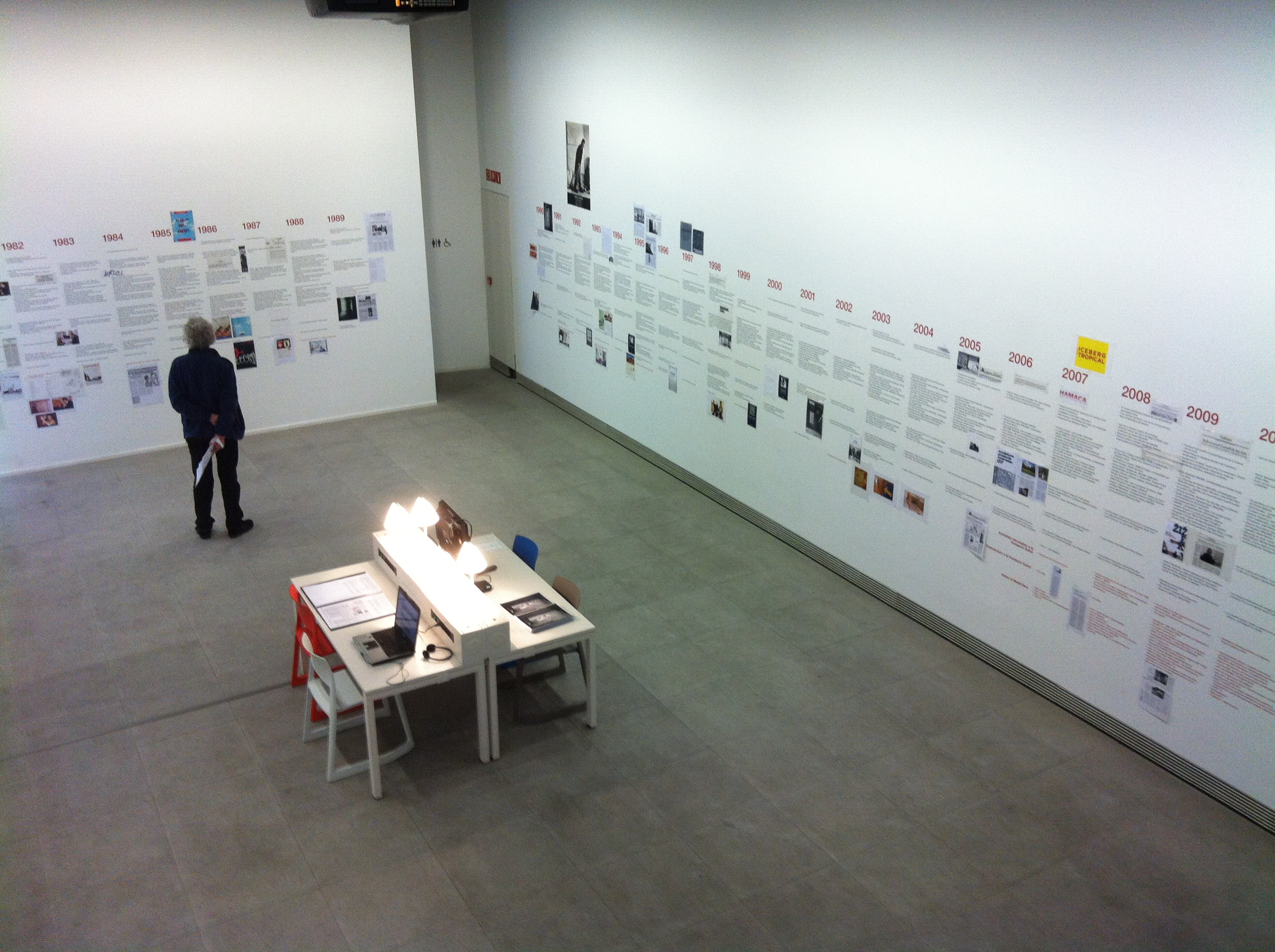 Fundació Suñol